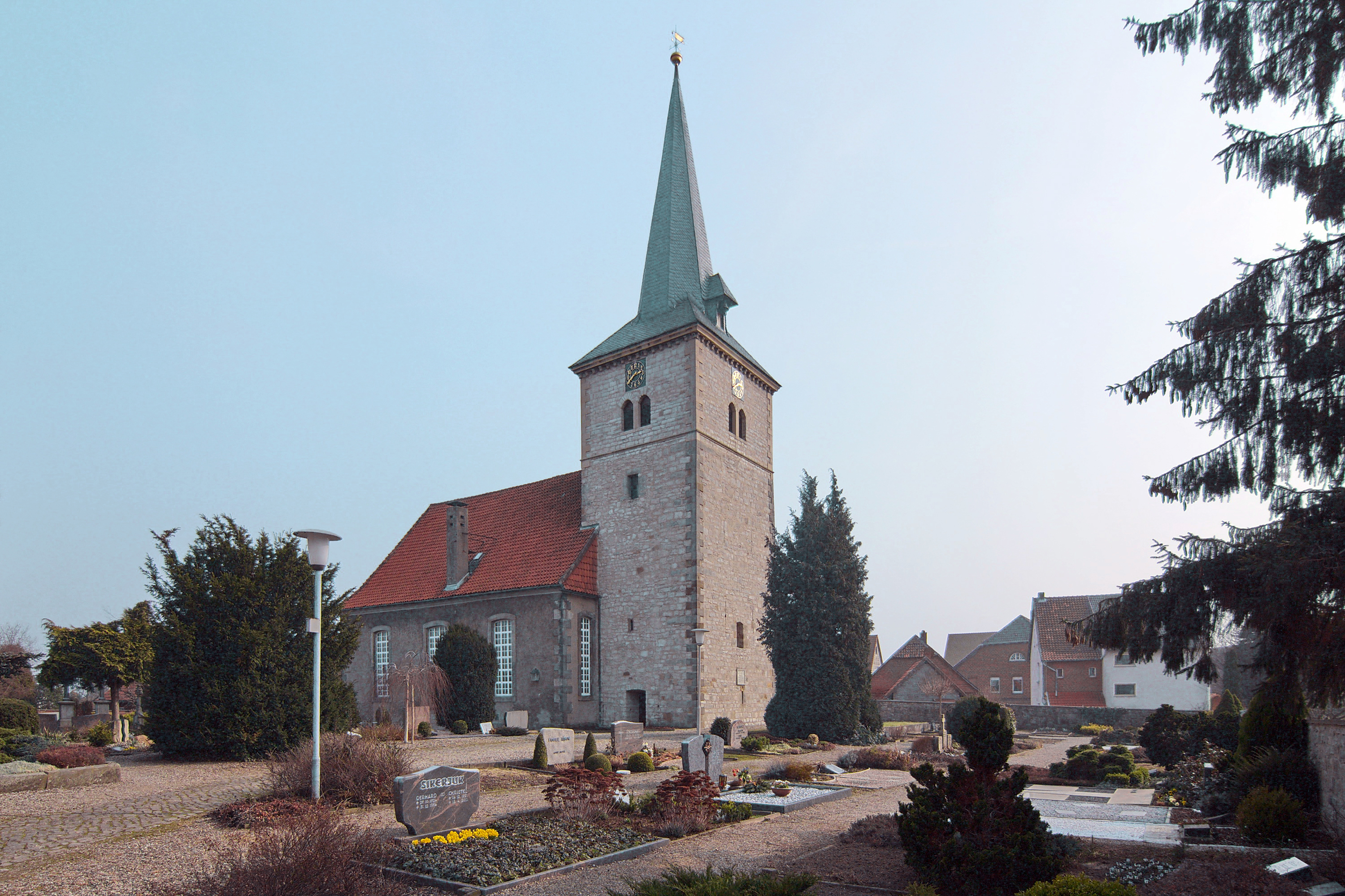 Marienkirche in Wülfingen (Elze), Niedersachsen, Deutschland.